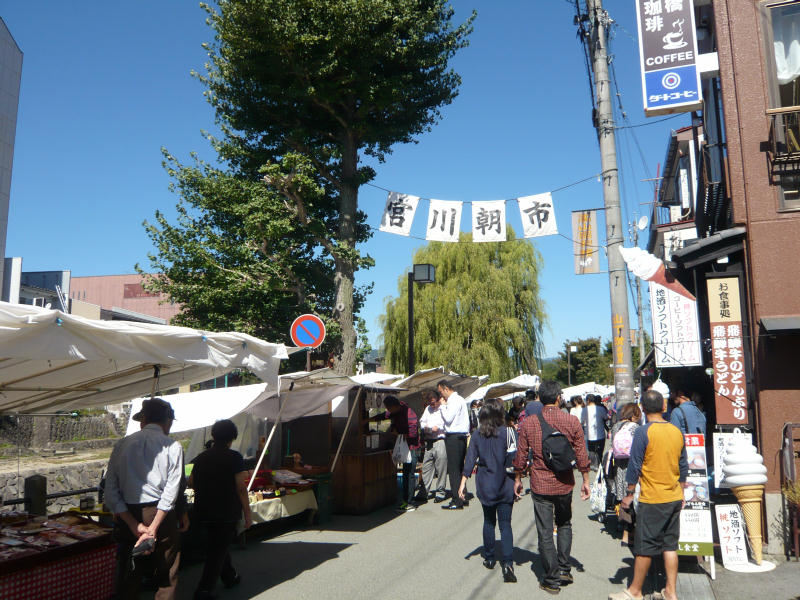 高山市宮川河畔、宮川朝市